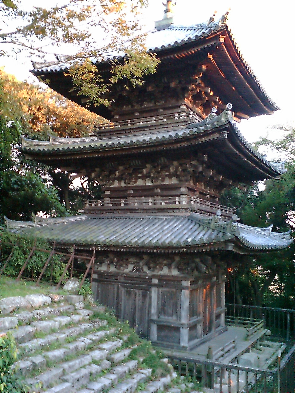 Azuchi Town Sokenji Tower